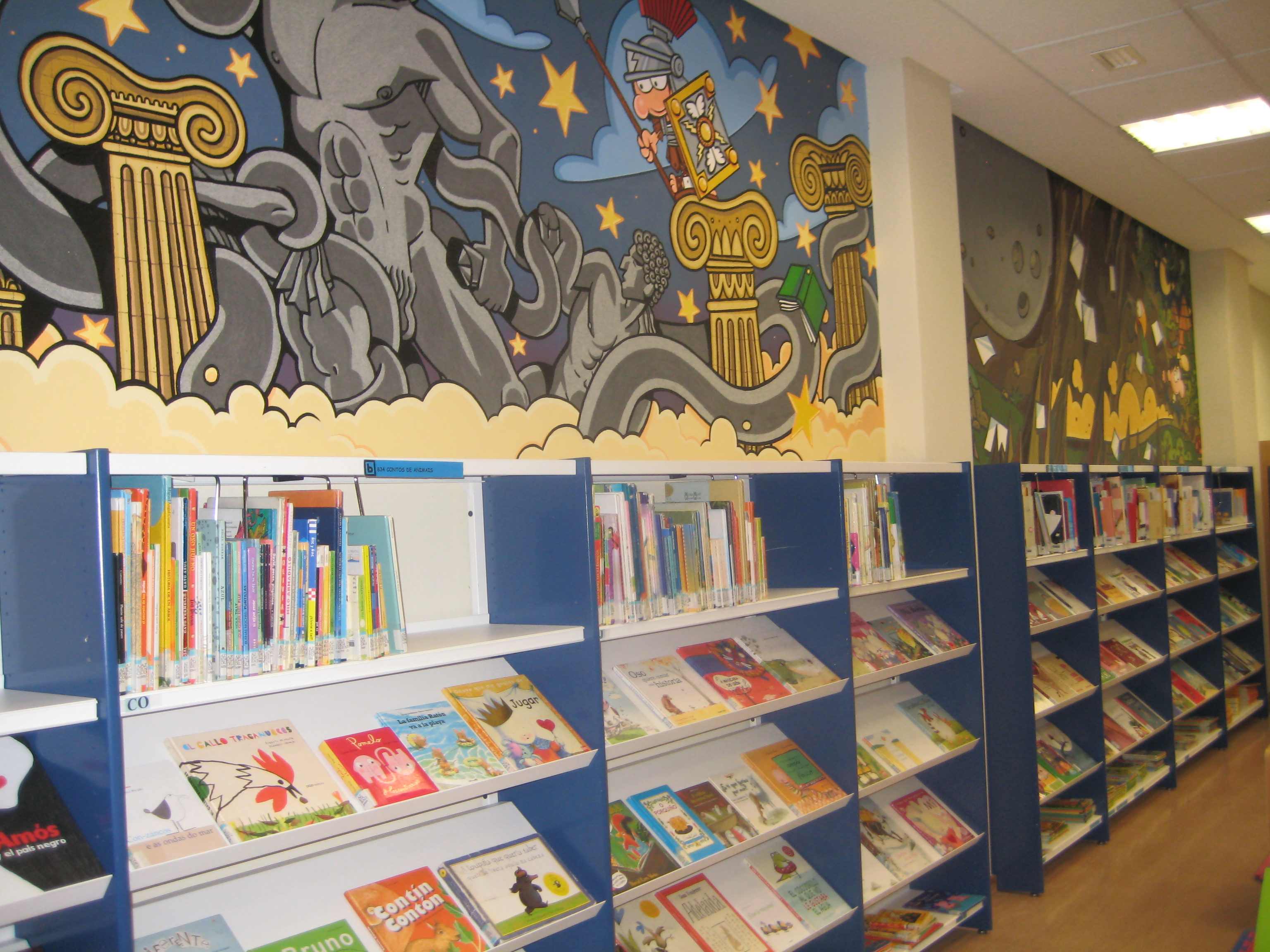 Sala infantil da Biblioteca de Pontevedra